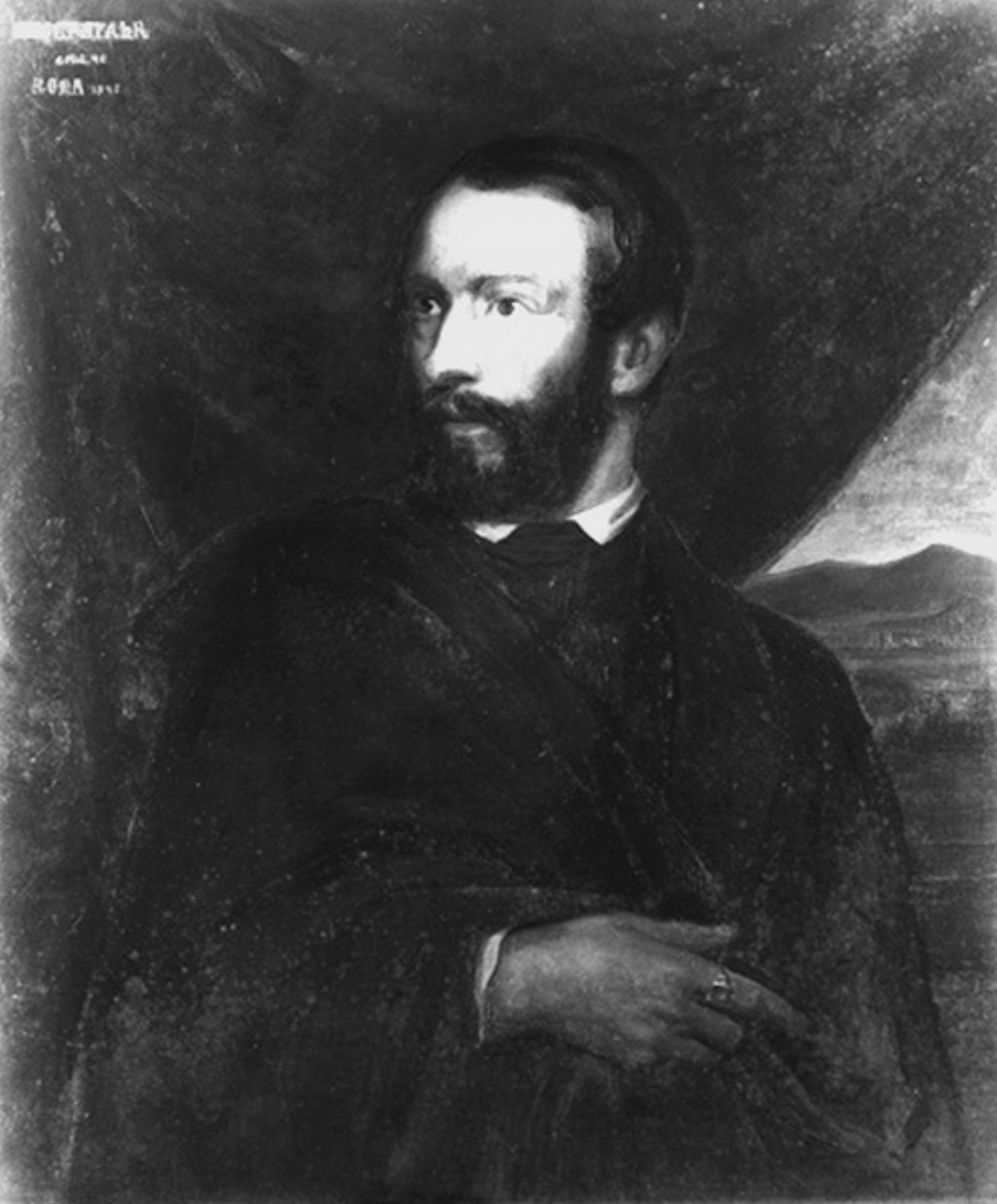 Adolf Stahr (1805-1876), deutscher Schriftsteller und Literaturhistoriker